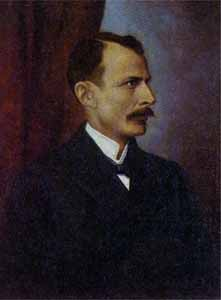 Rafael Uribe Uribe. Oleo de Francisco A. Cano. Museo de Antioquia, Medellín.